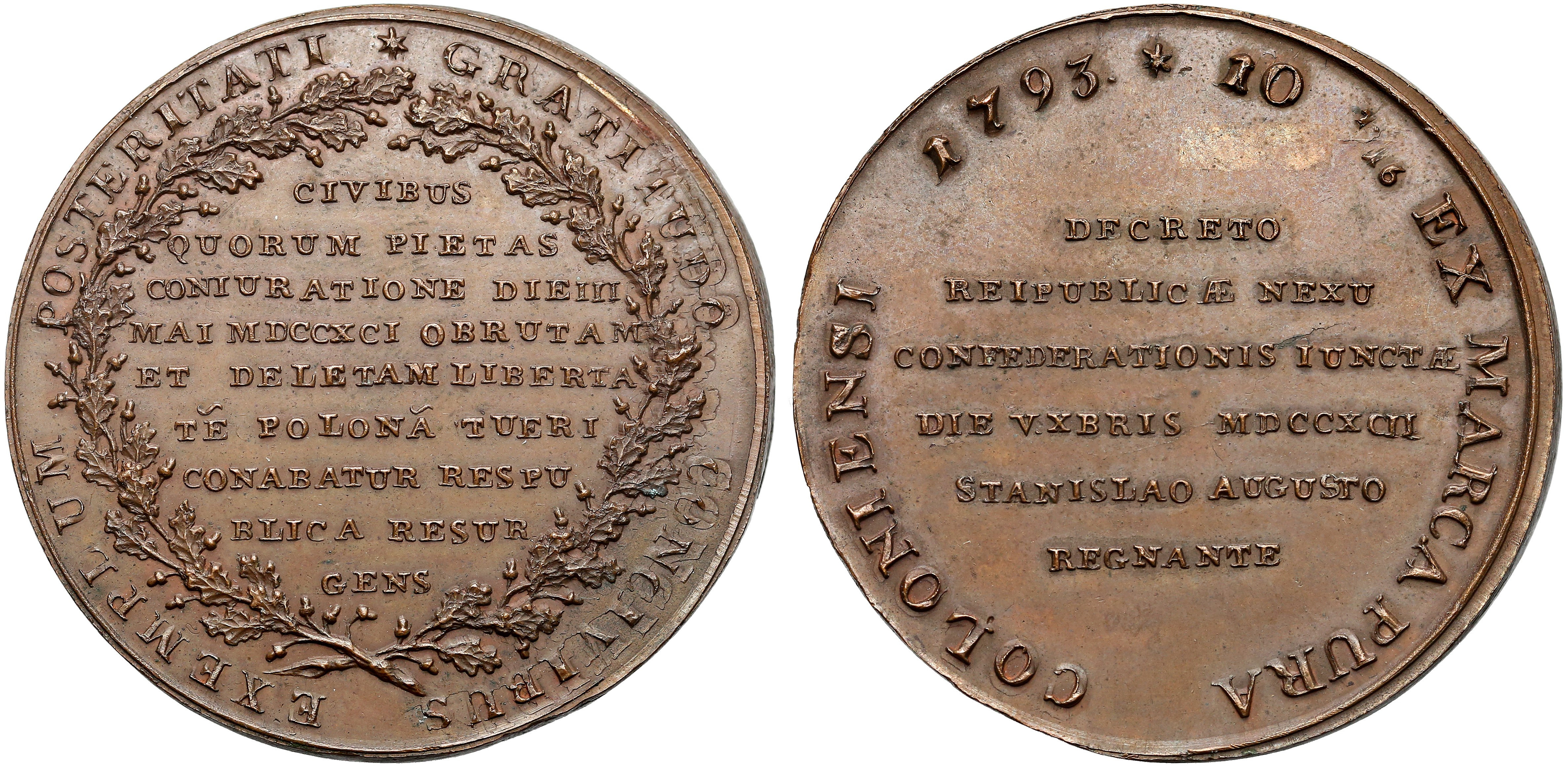 Talar targowicki 1793 miedź